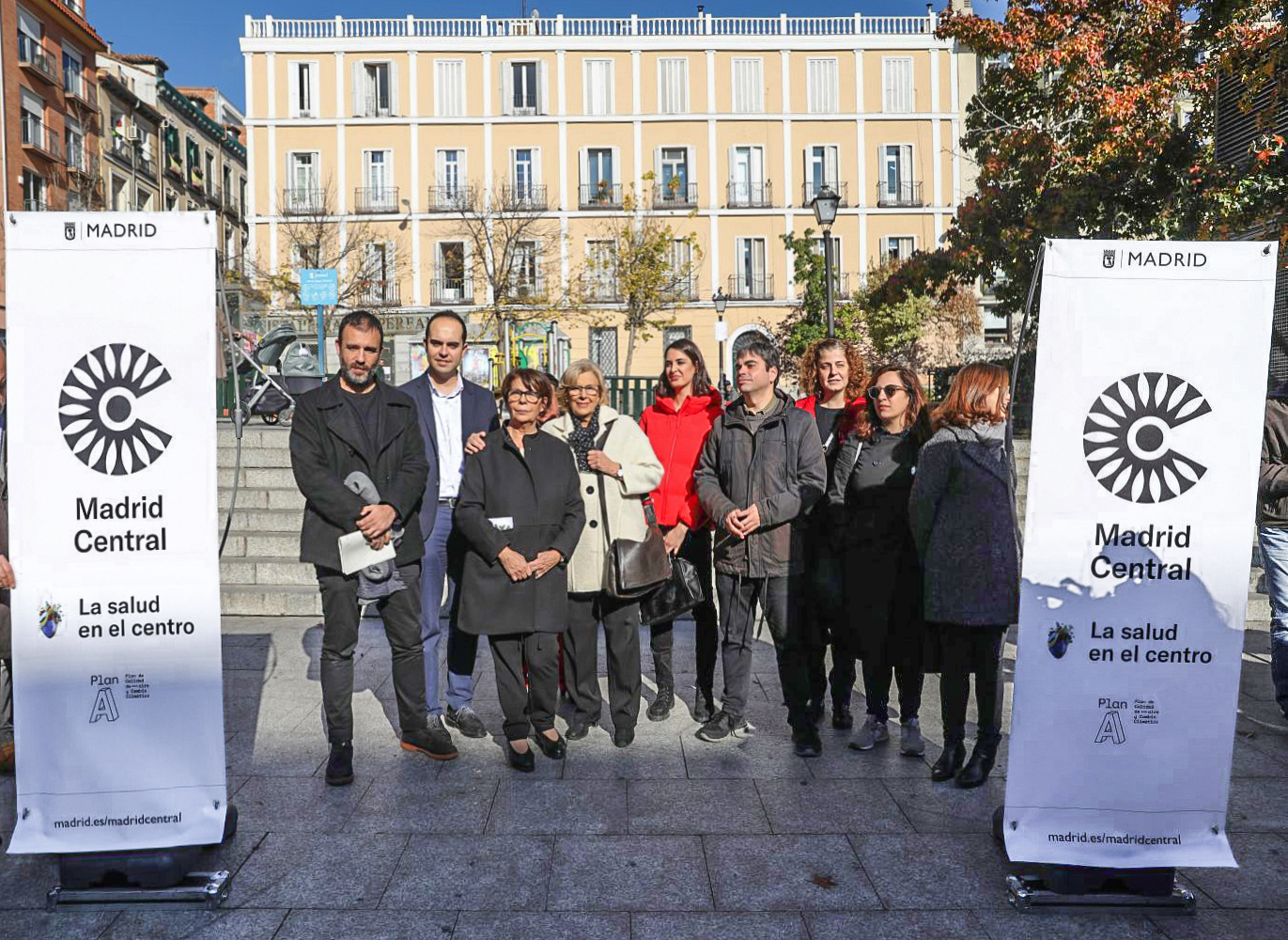 Madrid Central entra en vigor. Manuela Carmena ha visitado esta mañana la nueva zona de bajas emisiones noviembre. Se observa una reducción muy significativa del tráfico durante la hora punta en toda la zona de Madrid Central con disminuciones generalizadas de entre el 10% y el 45% así como una mejoría del servicio de la EMT. El Ayuntamiento ha mantenido contactos con asociaciones vecinales, comerciantes, administraciones y asociaciones profesionales para dar a conocer Madrid Central y recoger sugerencias. 30/11/2018. Madrid Central ya está en vigor. Este 30 de noviembre, a las 00.00, ha arrancado esta zona de bajas emisiones, incluida en el Plan de Calidad del Aire y Cambio Climático, con el objetivo de reducir la contaminación, el ruido y mejorar el reparto del espacio público. Hoy la alcaldesa de Madrid, Manuela Carmena, la delegada de Medio Ambiente y Movilidad, Inés Sabanés, el delegado de Desarrollo Urbano Sostenible, José Manuel Calvo y el delegado de Economía y Hacienda y distrito Centro, Jorge García Castaño, han presentado la entrada en vigor de Madrid Central y han realizado un recorrido desde la Plaza de Callao hasta la Plaza de Pedro Zerolo bajando por la Gran Vía.